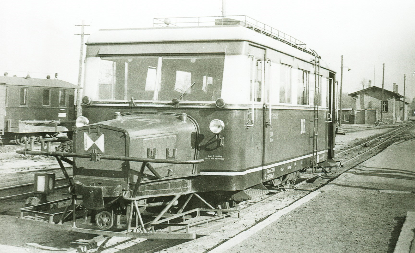 Foto des VT 133 525 auf einer historischen Aufnahme von Georg Otte